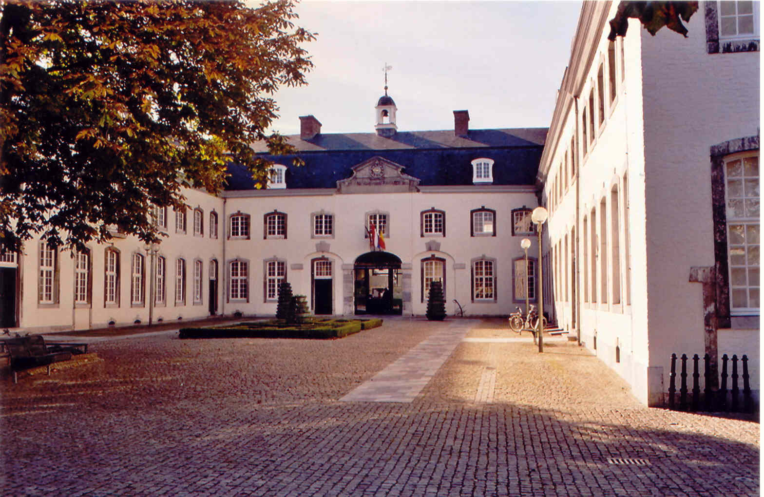 Tuchverlegergebäude Johann Arnold Clermont (1728-1795), erbaut von Joseph Moretti in Vaals, heute Sitz der Gemeindeverwaltung